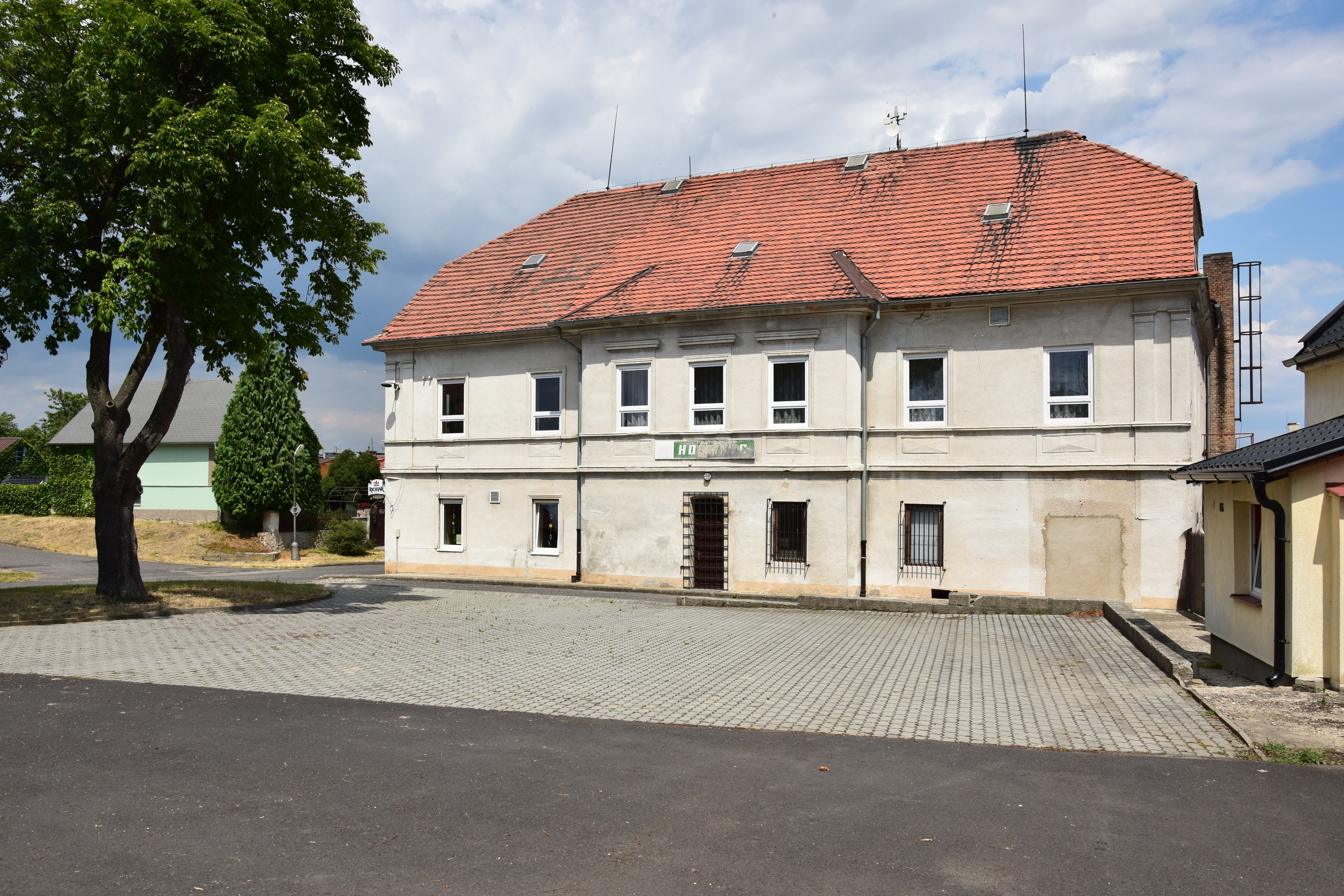 Poláky – dům čp. 11 (hostinec)